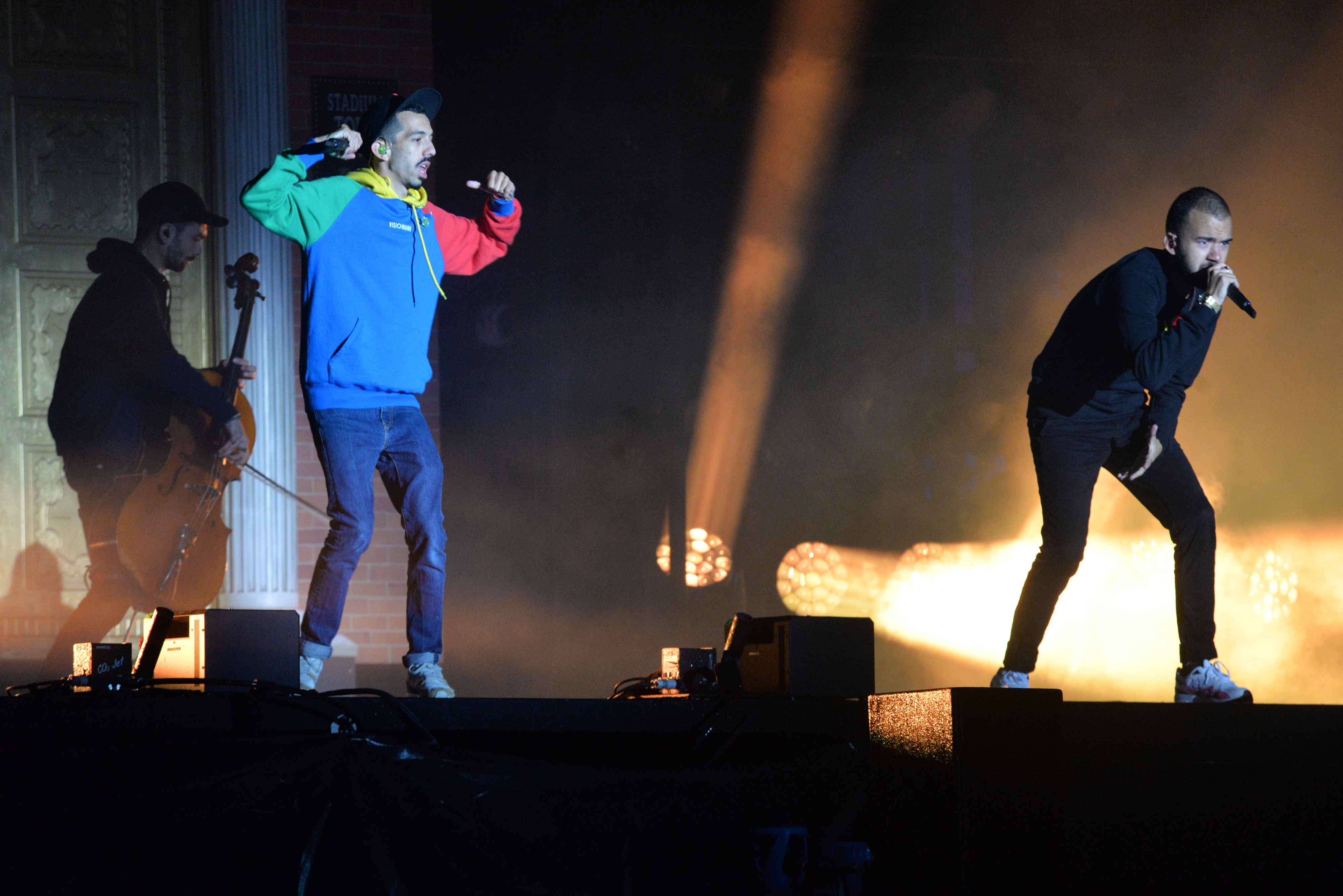 Concert de Bigflo et Oli au festival Papillons de nuit 2019 à Saint-Laurent de Cuves, Manche, Normandie.